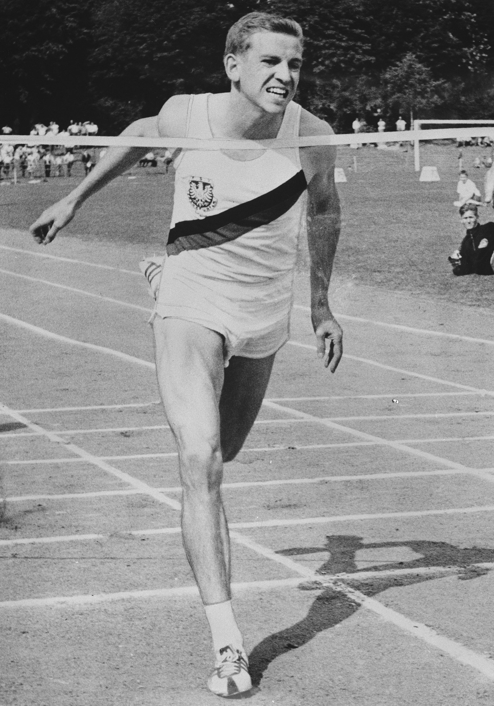 Collectie / Archief : Fotocollectie Anefo Reportage / Serie : [ onbekend ] Beschrijving : Armin Hary de droomatleet Datum : 4 augustus 1960 Persoonsnaam : Armin Hary Fotograaf : Fotograaf Onbekend / Anefo Auteursrechthebbende : Nationaal Archief Materiaalsoort : Glasnegatief Nummer archiefinventaris : bekijk toegang 2.24.01.09 Bestanddeelnummer : 911-4786